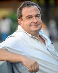 Foto de Bernat Joan